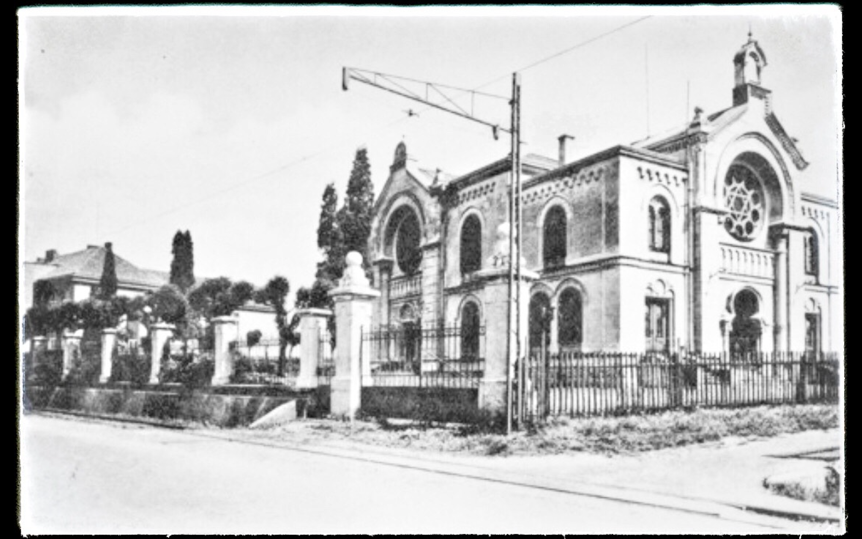 Synagoga v Orlové